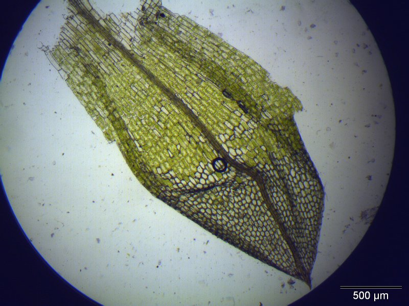 Wetteranzeigendes Drehmoos (Funaria hygrometrica), Blatt, 40x vergrößert